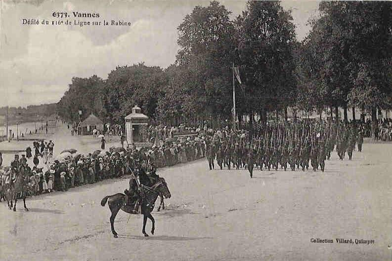 Défilé du 116e Ri sur la Promenade de la Rabine à Vannes en 1914